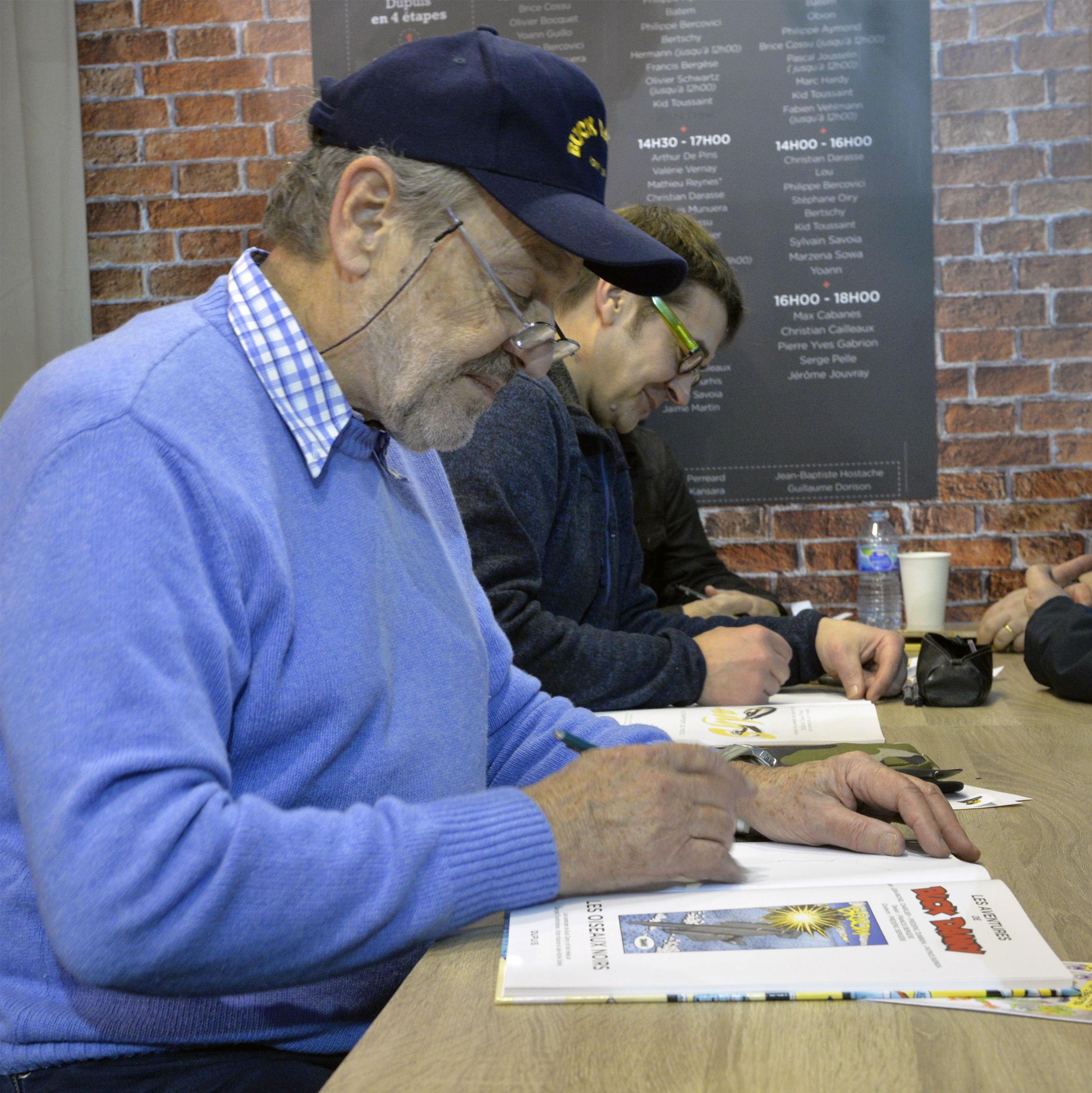 Francis Bergèse, Festival International de la Bande Dessinée d'Angoulême 2017.